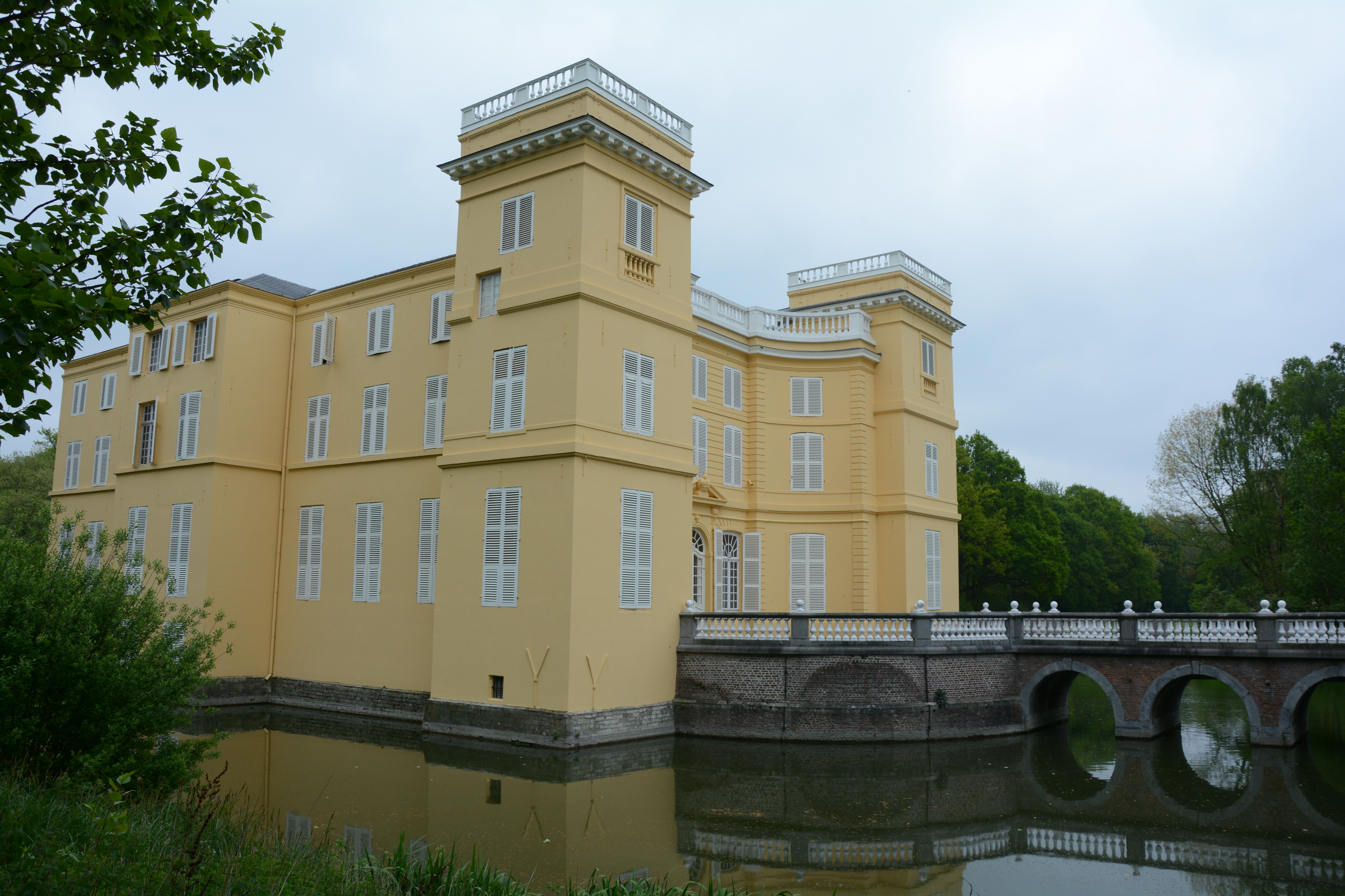 Kasteel d'Ursel, Hingene (Bornem)